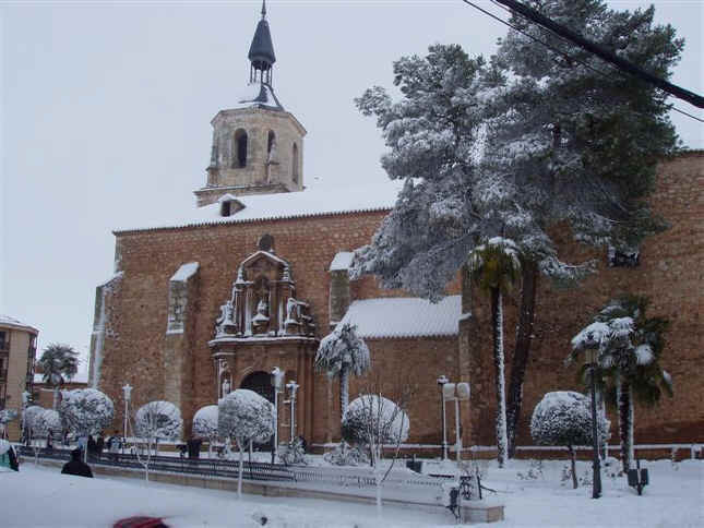 Parroquia de San Pedro Apóstol (nevada).